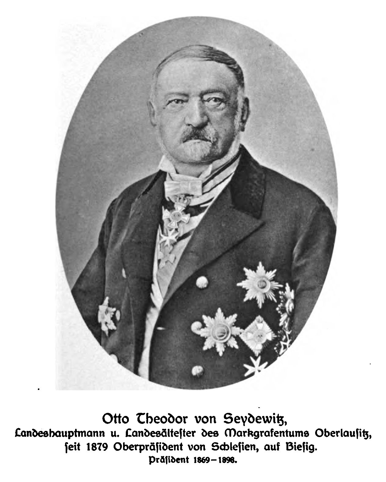 Otto Theodor von Seydewitz (1818-1898), in: Neues lausitzisches Magazin, Band 80.